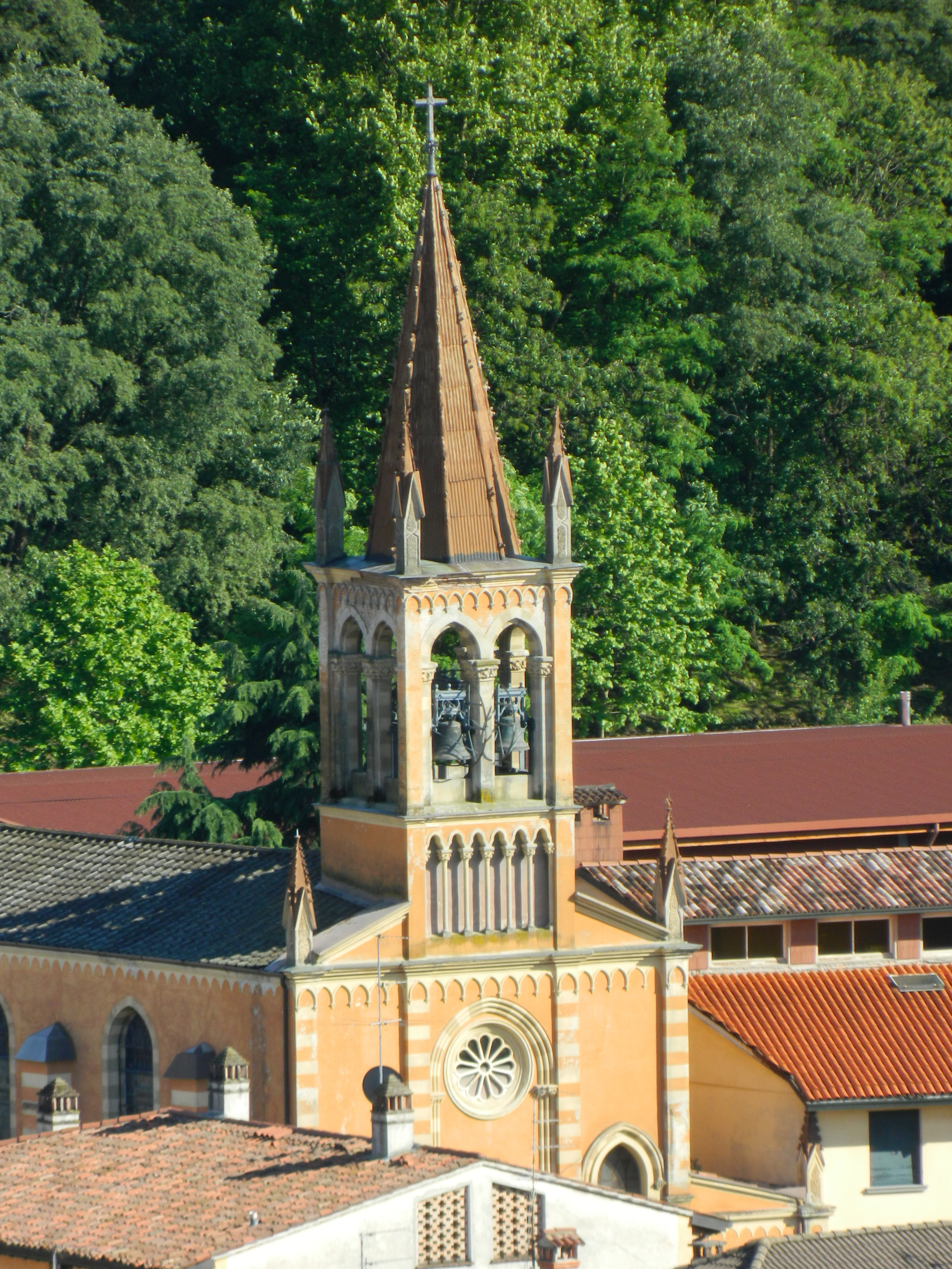 La facciata della "Madonnina" di Palazzolo sull'Oglio